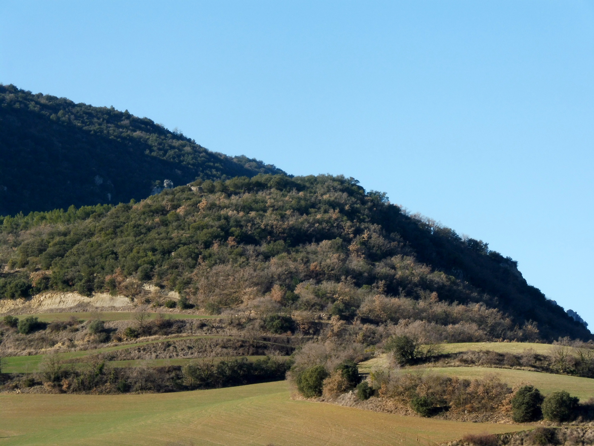 Fortificació i Sant Salvador del Vilot d'Alberola (Os de Balaguer): des d'Alberola